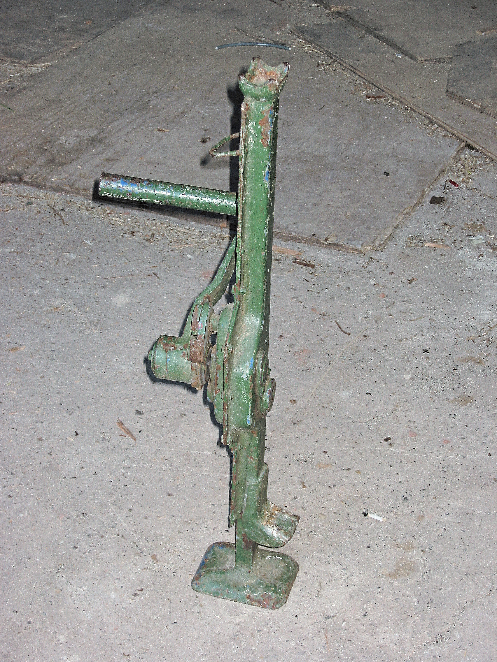 Dommekracht